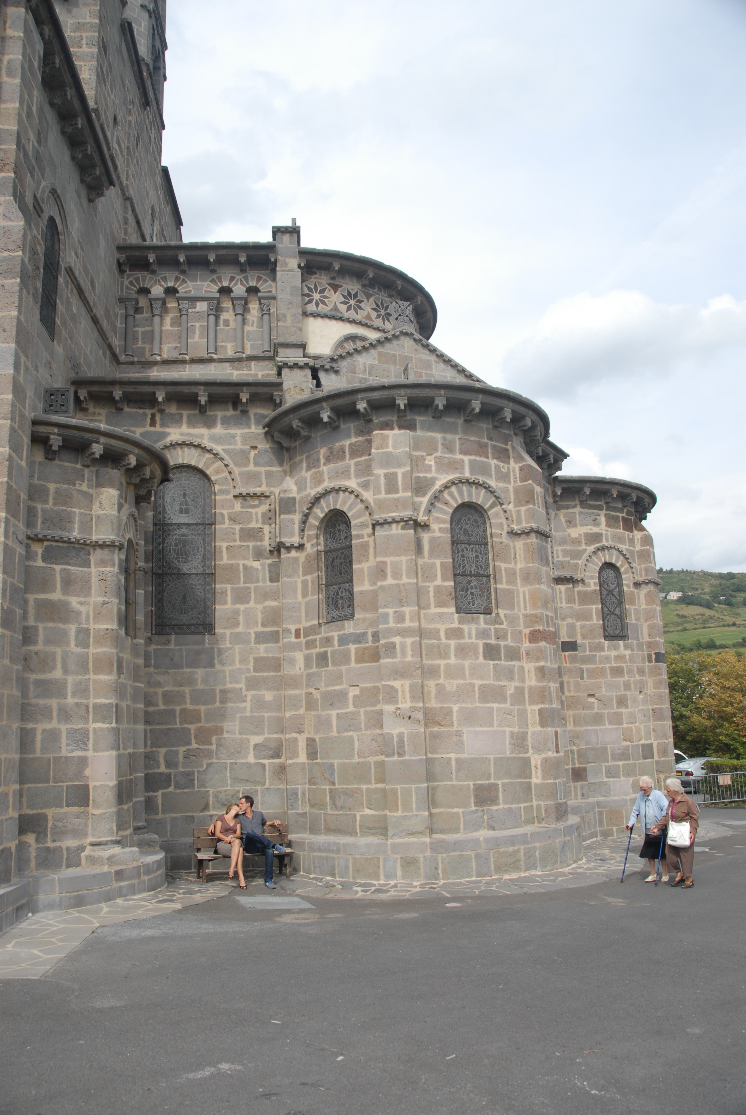 St.-Nectaire, Chorhaupt von S